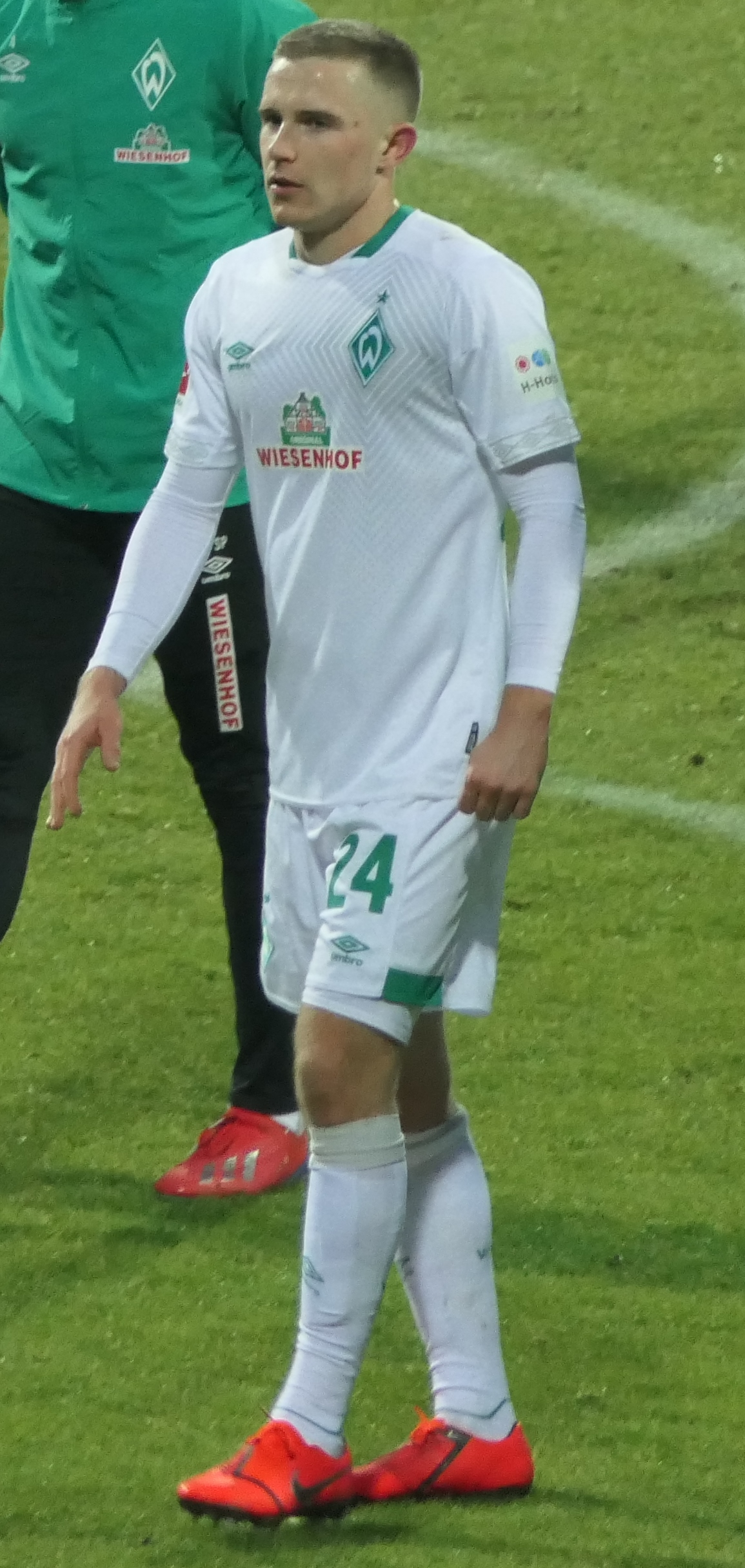 Der Fussballprofi Johannes Eggestein im Trikot vom SV Werder Bremen beim Auswärtsspiel gegen den 1.FC Nürnberg am 02.02.2019.